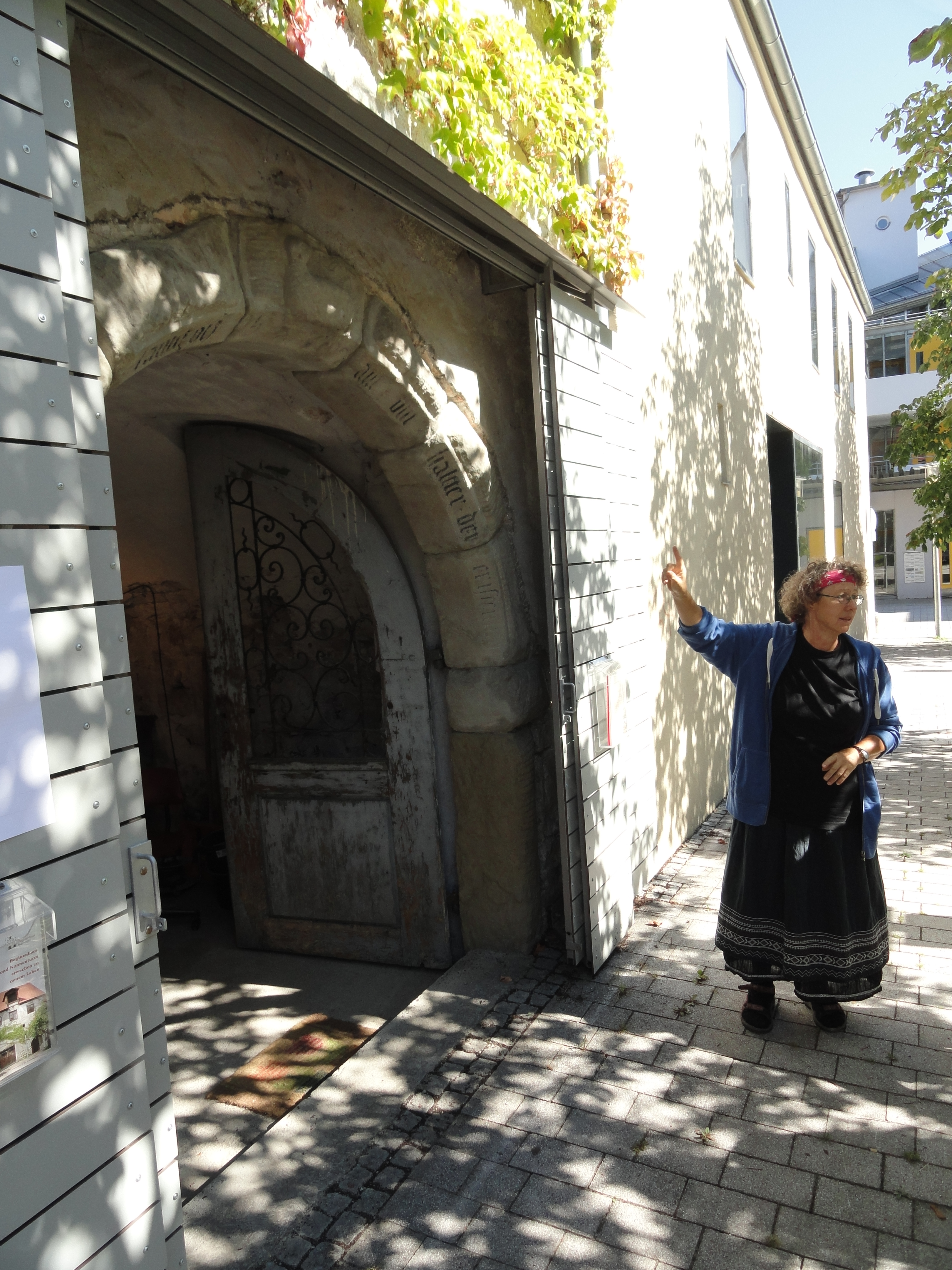 Bernadette Mayr bei einer Führung durch das Beginenhaus-Ensemble in Kempten.